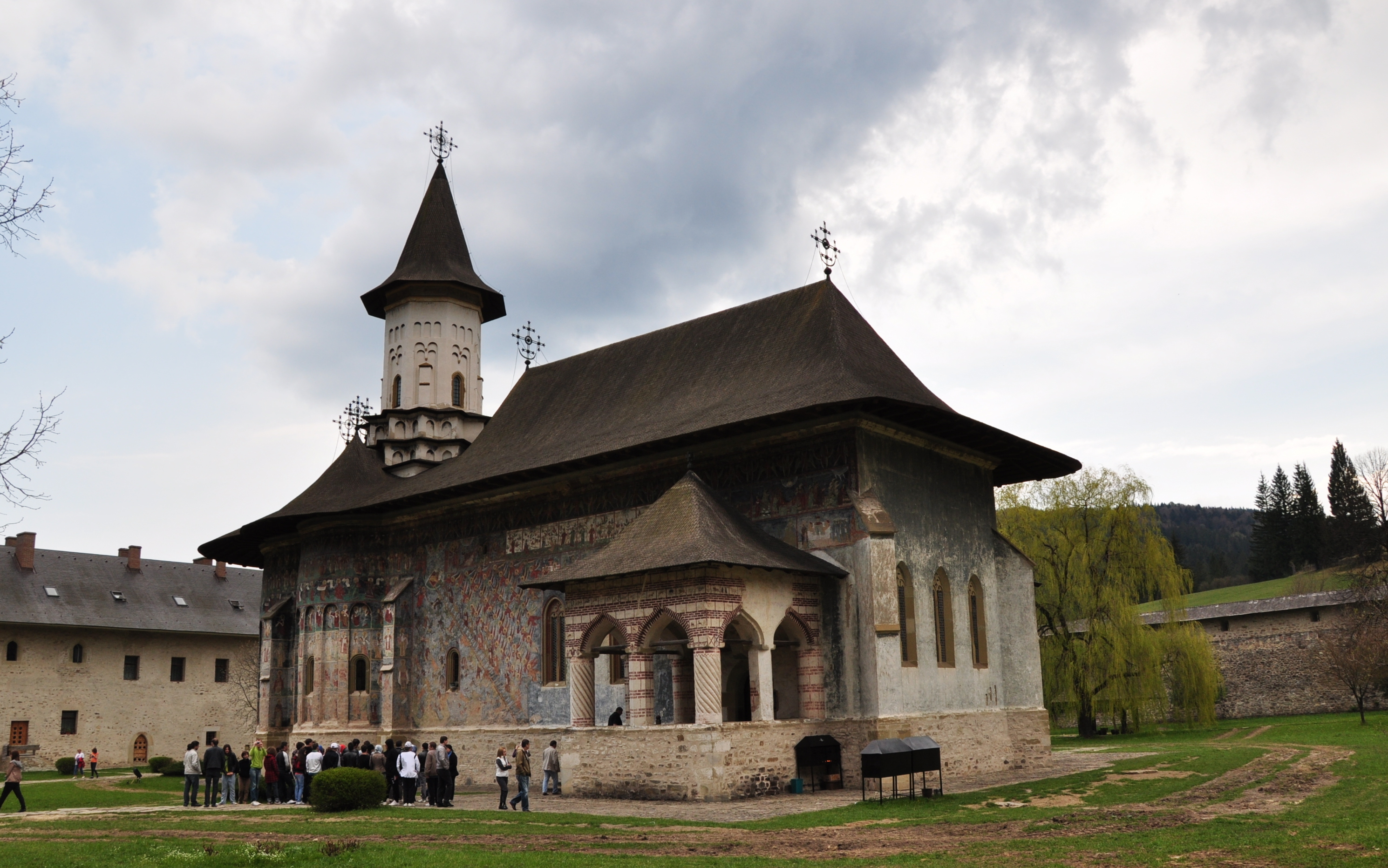 Mănăstirea Sucevița